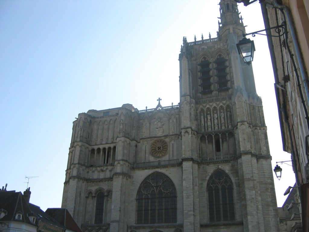 Cathédrale de Sens, Yonne, France : façade